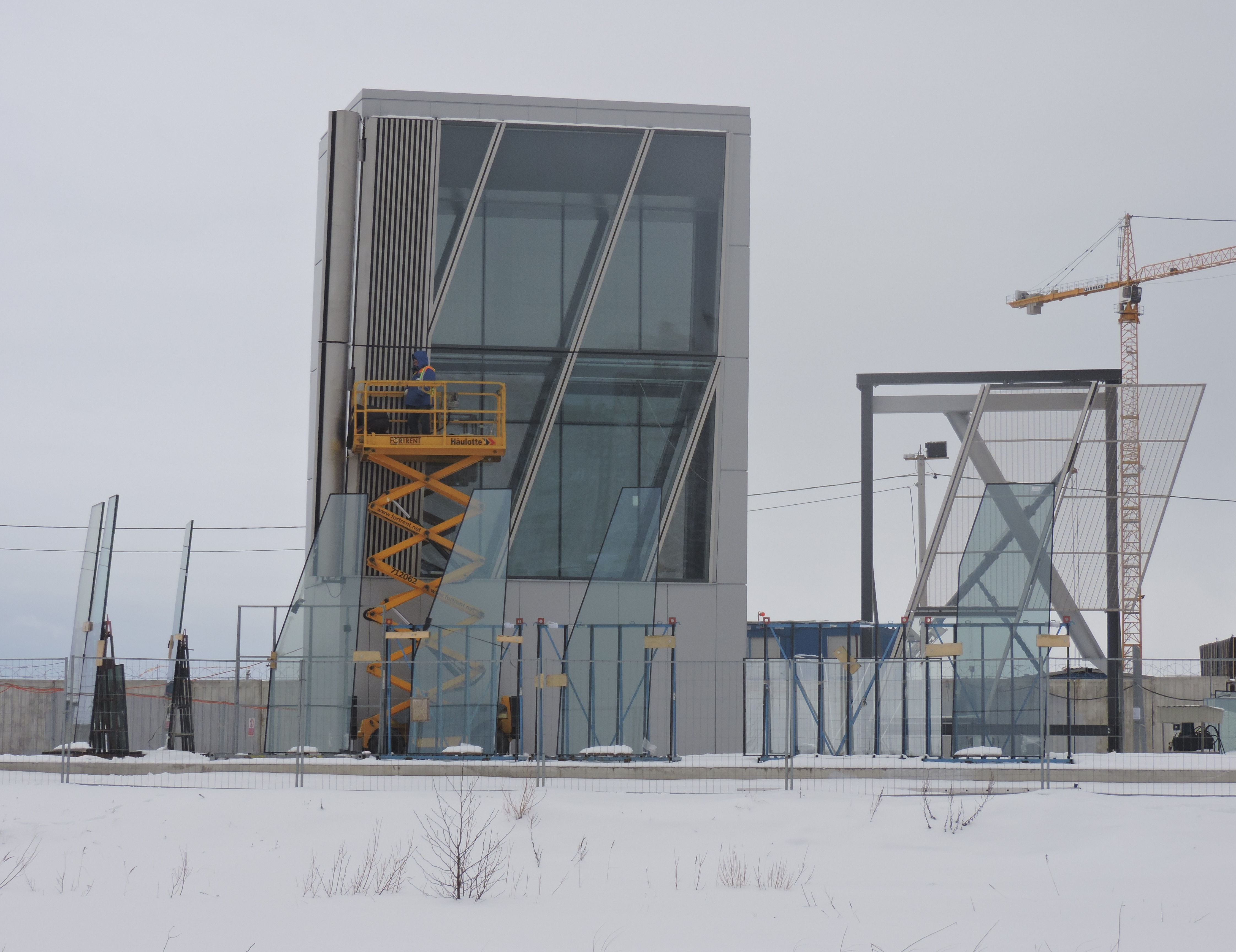 Стенд со стеклопакетами, которыми остекляется Лахта-центр